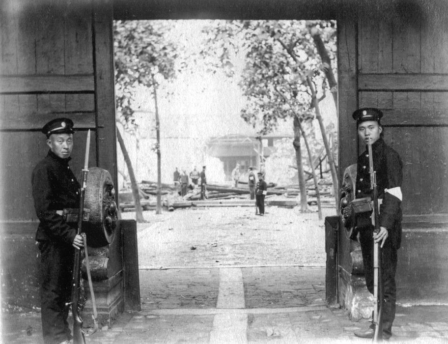 1911年辛亥革命军占领上海道台衙门。